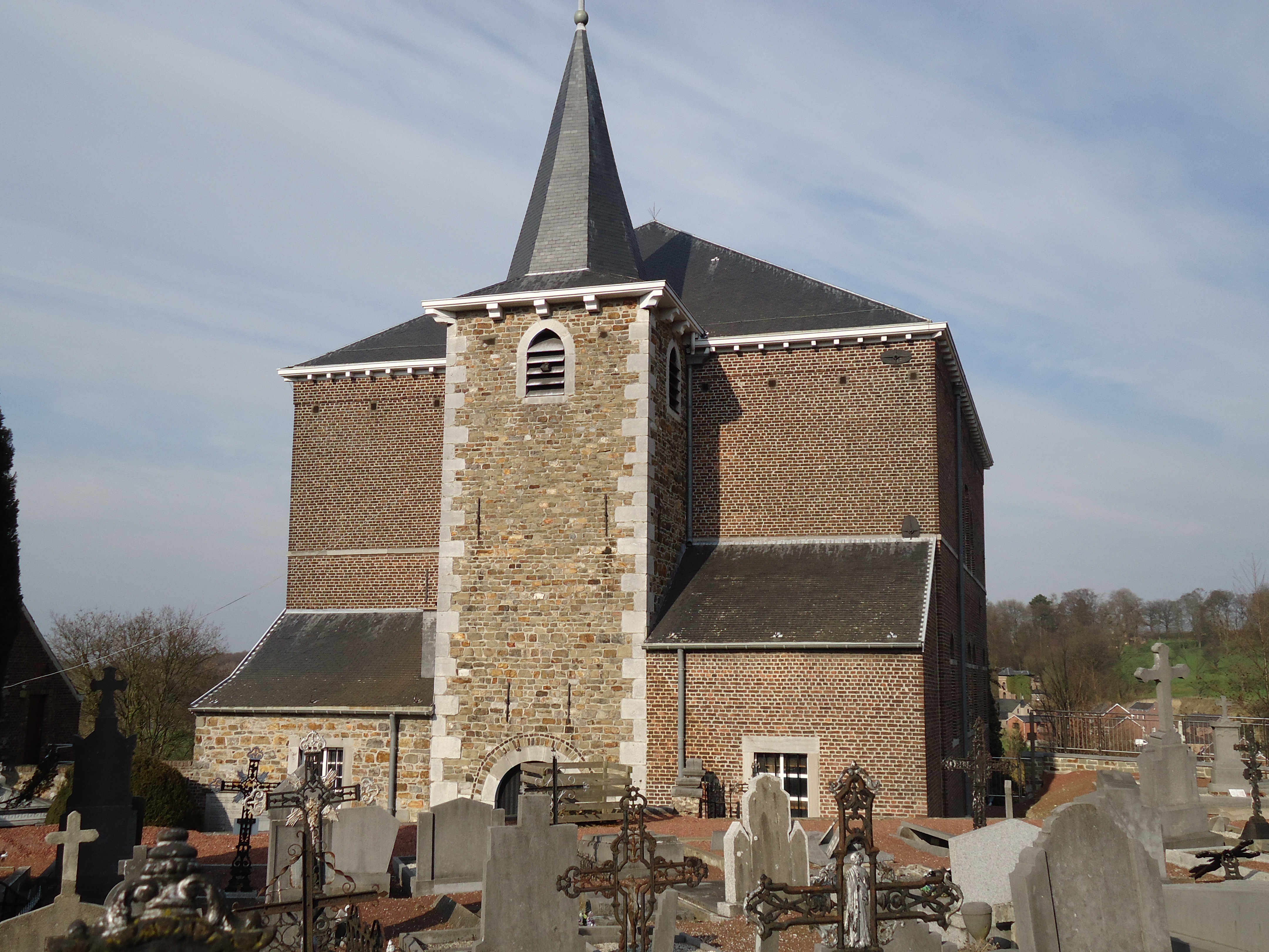 Vue depuis l'ancien cimetière